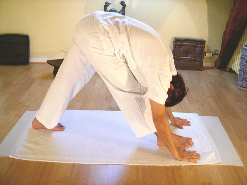 Yoga postures Parshvottanasana